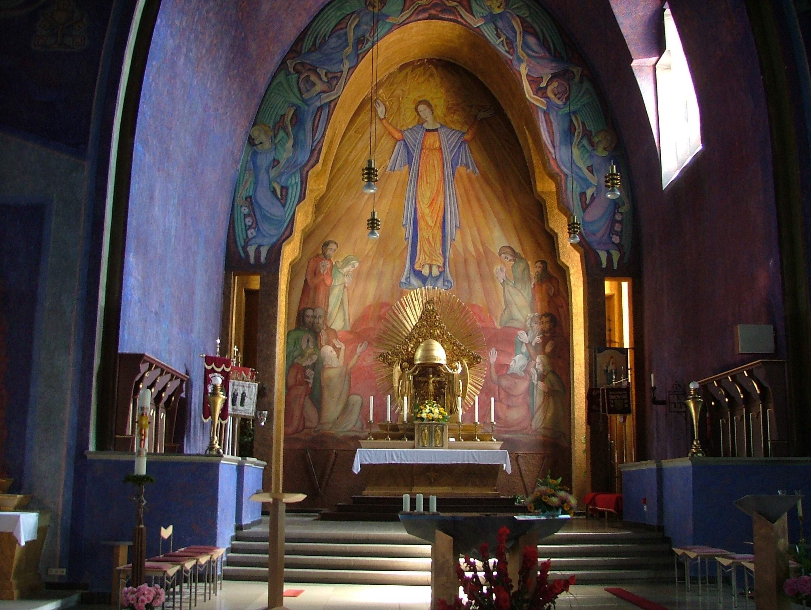 Mystisches Dunkel